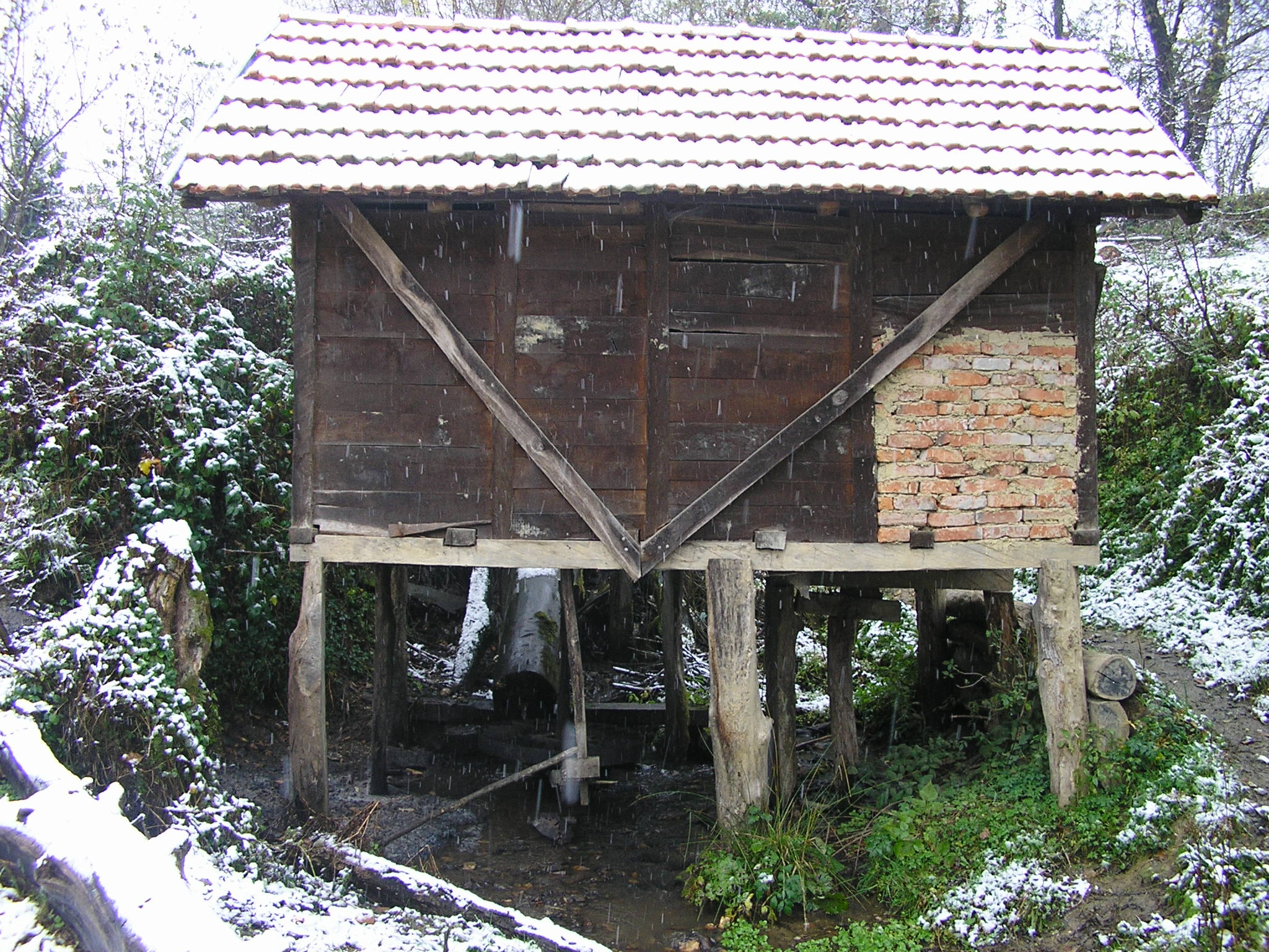 Слика воденице у селу Јежештица. Аутор лично Славиша Остојић